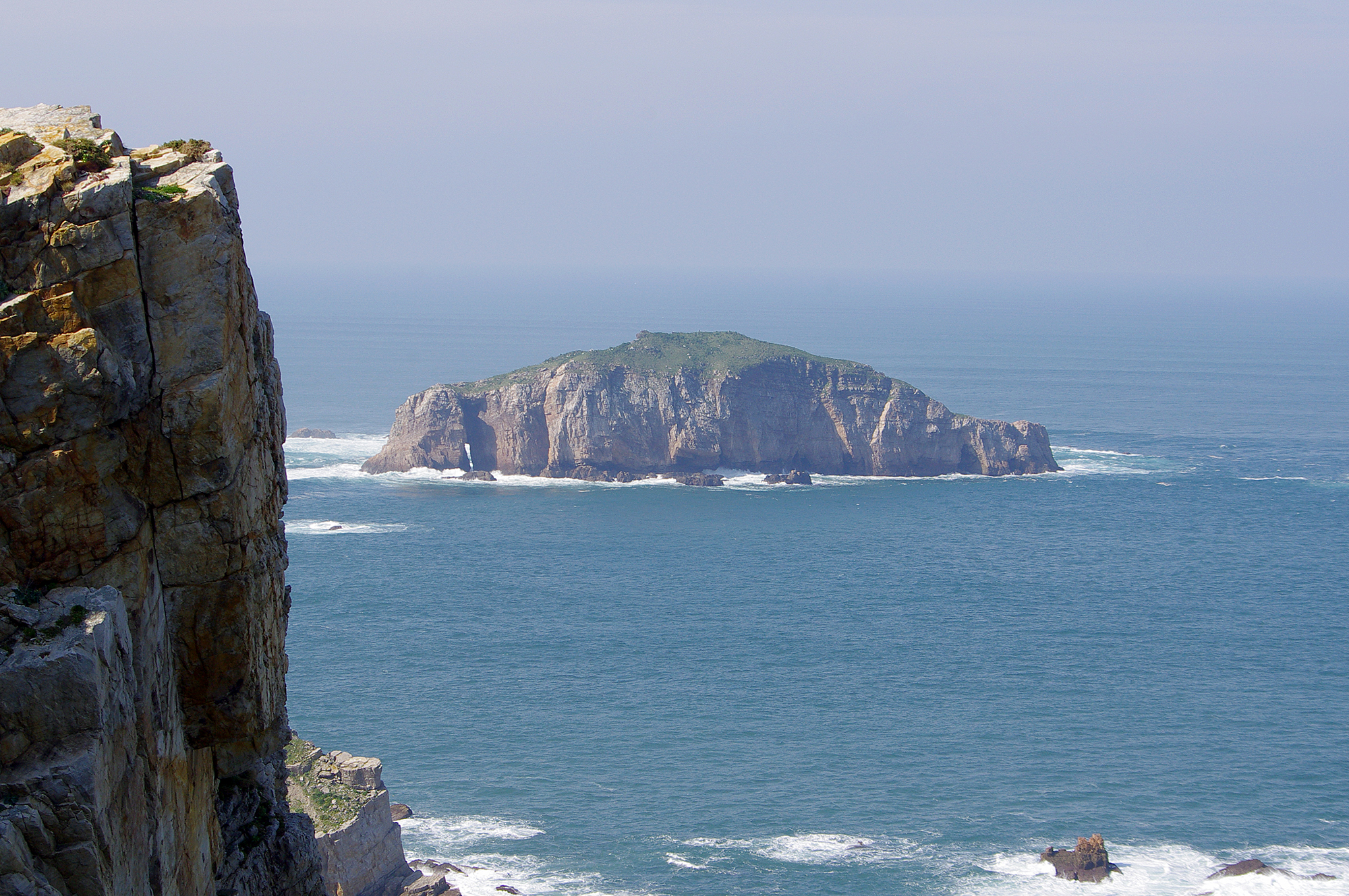 Isla Herbosa. Foto desde el mirador de Cabo de Peñas.